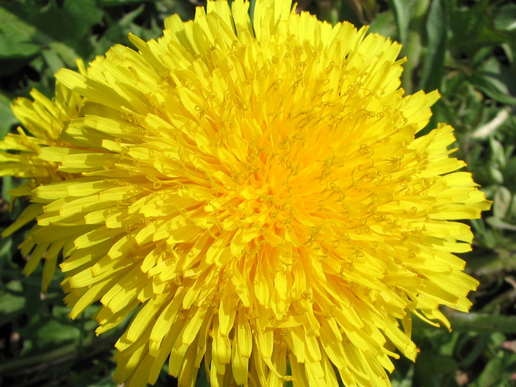 dandelion